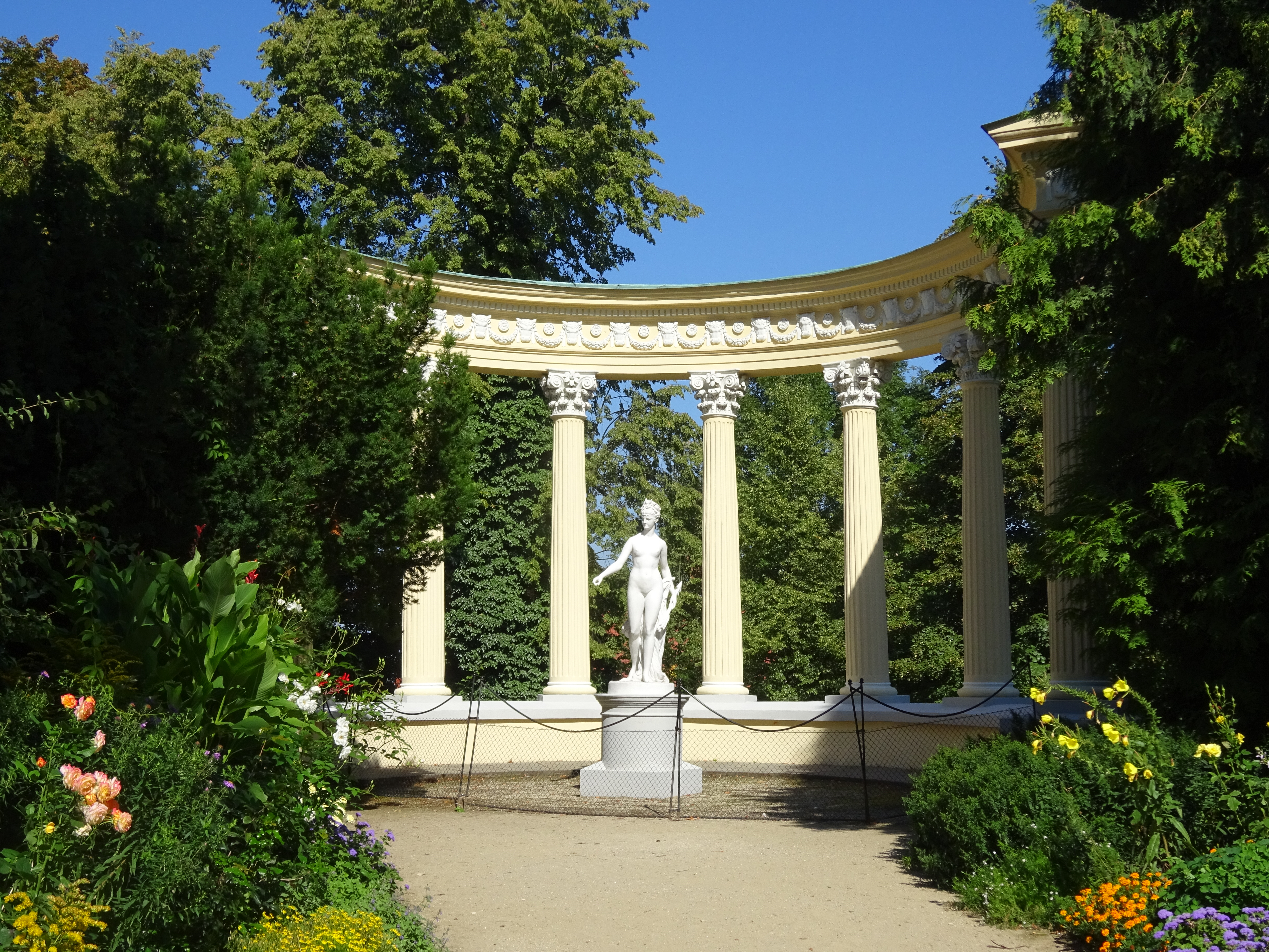 Glorieta w Parku Zamkowym w Łańcucie.